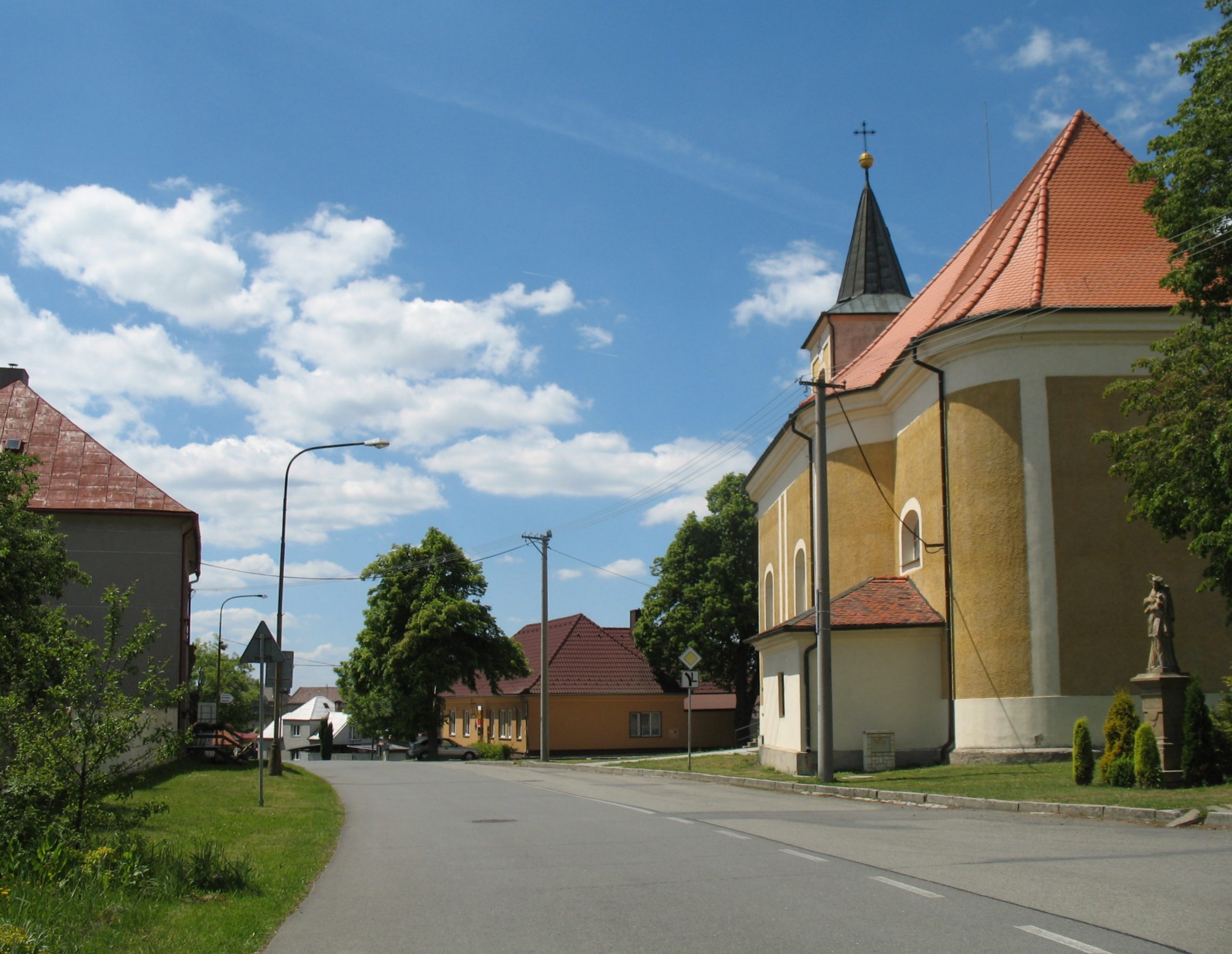 Centrum obce u úřadu městysu Drahany. V popředí silnice II/377, vpravo kostel sv. Jana Křtitele